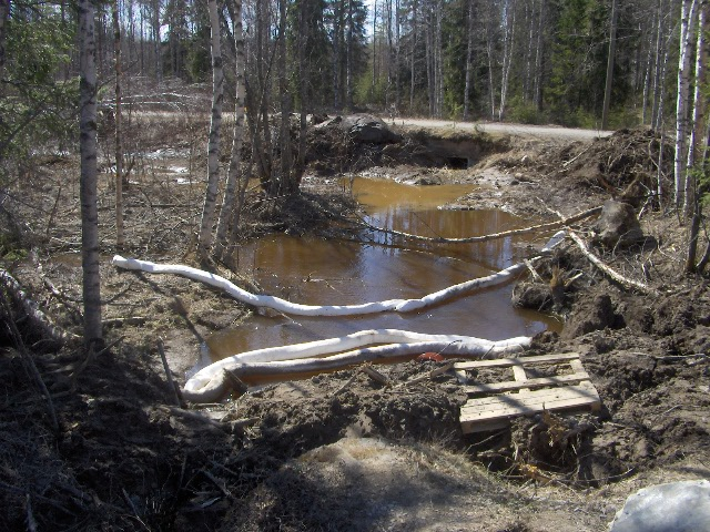 Öljyntorjuntapuomeja Mätäspurolla 5 km päässä vahinkopaikalta